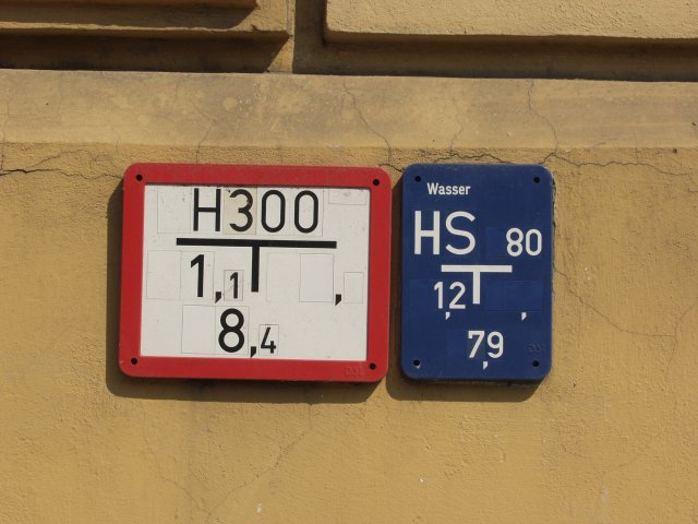 Hinweisschild auf einen Unterflurhydranten mit zugehörigem Hinweisschild zum Hydranten-Absperrschieber, fotografiert im März 2005 in Linz.